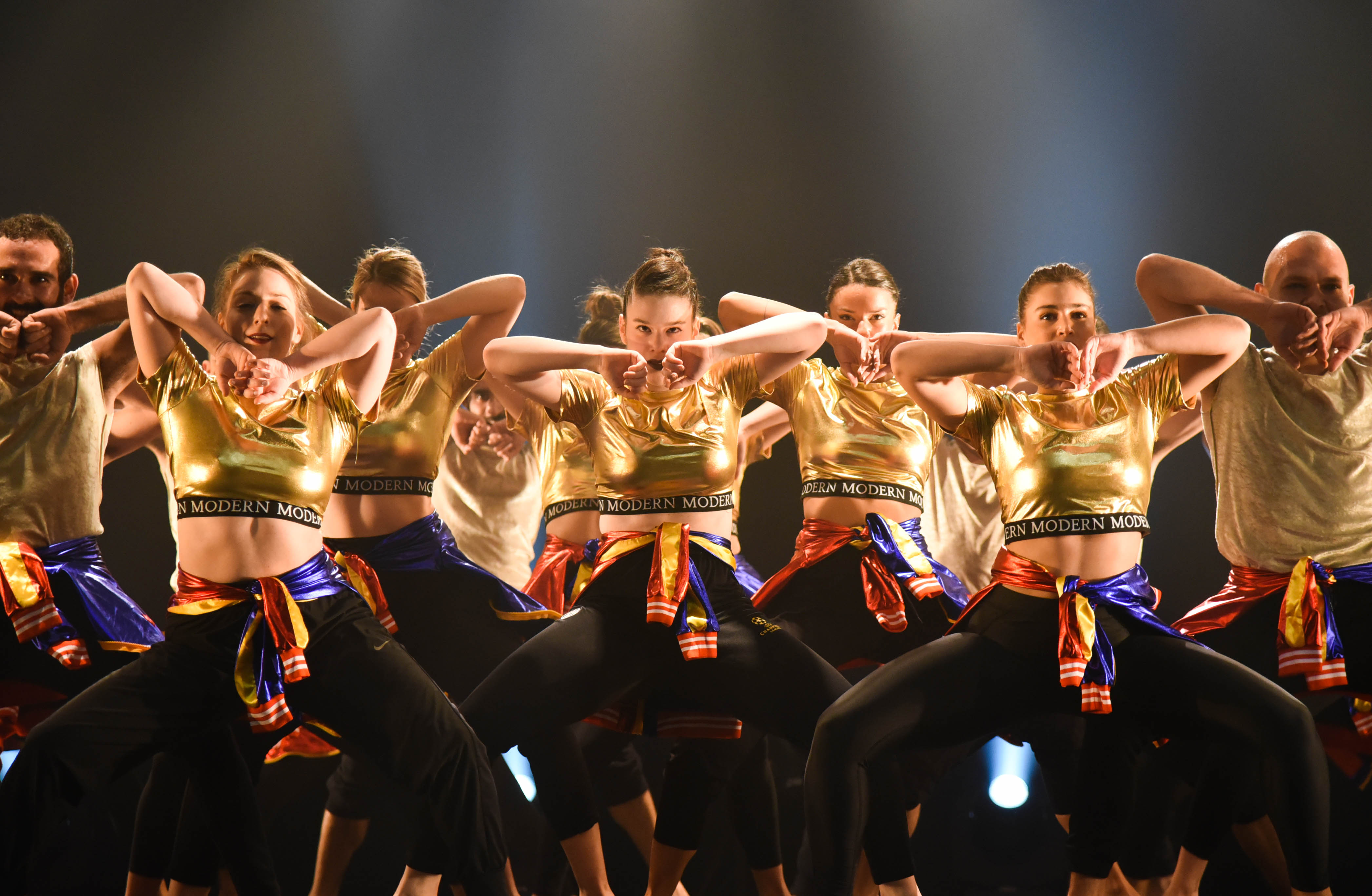 תמונת מחול